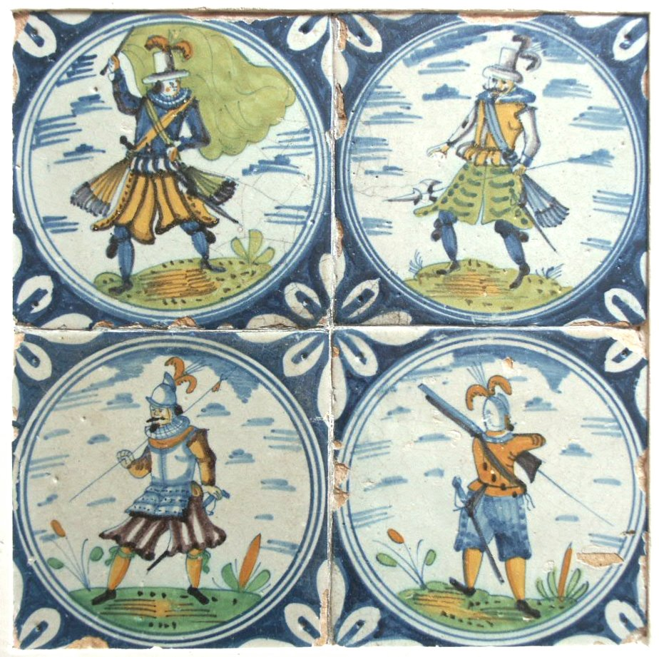 foto van exemplaar in eigen bezit